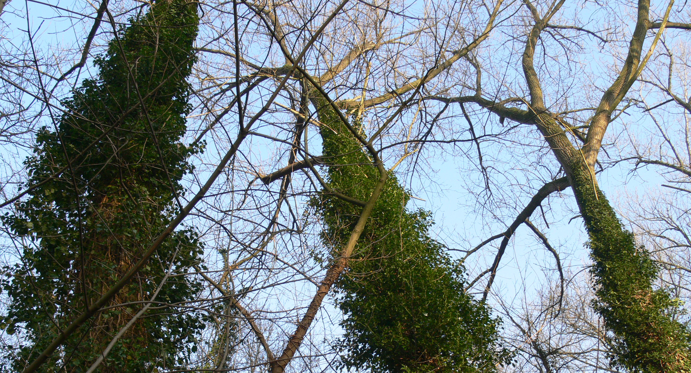 Lierre, forme typique du lierre dans un sous-bois clair, (ici Bois de la citadelle, Lille, Nord de la France).